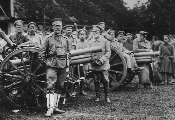 Летом 1916 года в ходе знаменитого Брусиловского прорыва дивизия генерала Гильчевского захватила 22 тыс. пленных